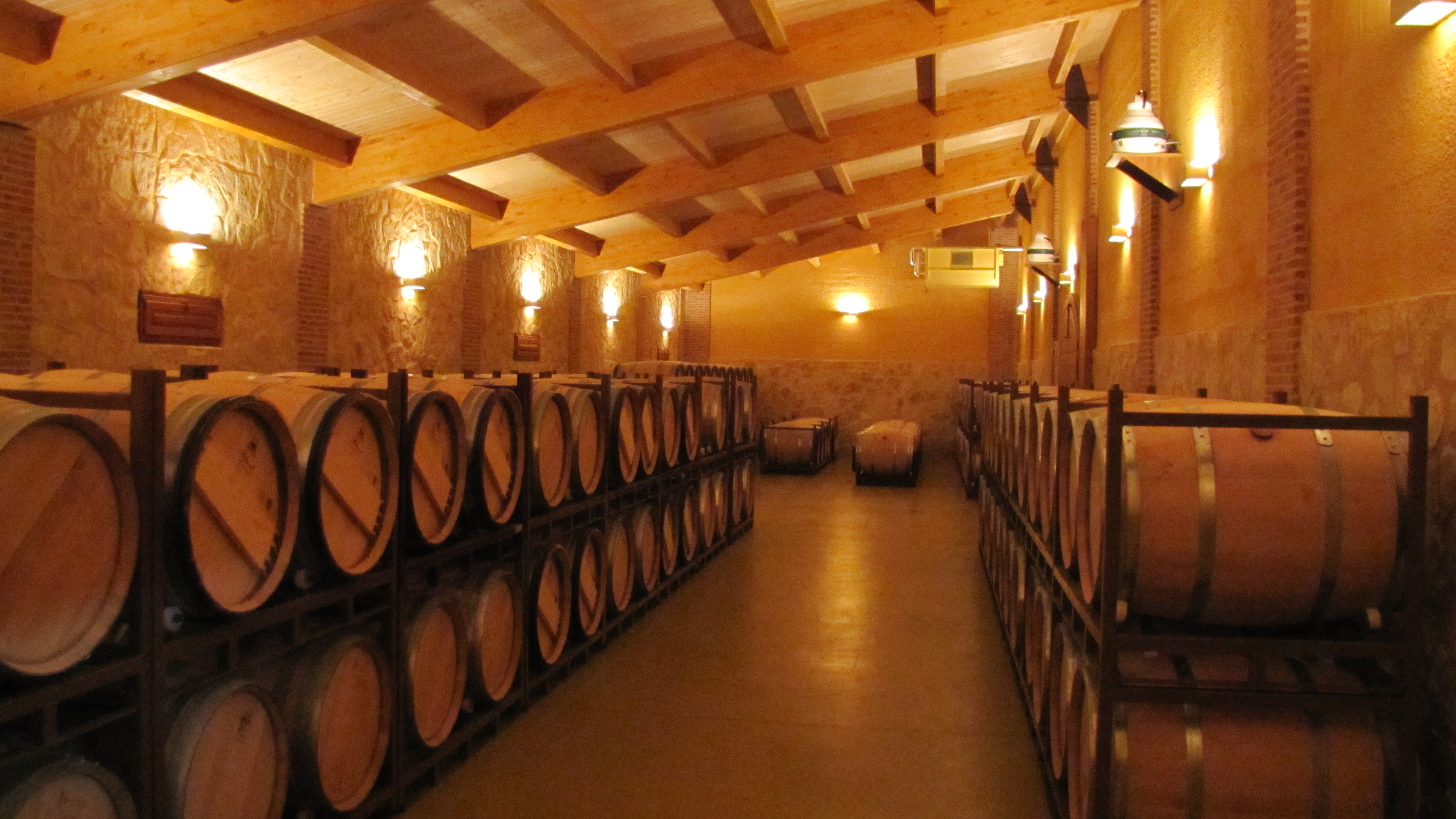 Bodega Subterránea de la bodega Viña Sastre - Hermanos Sastre, en la Ribera del Duero burgalesa, en el pueblo de La Horra. En la sala hay cientos de barricas, o cubas, llenas de vino.